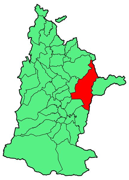 Aipaturiko udalerriaren kokapena Zuberoan